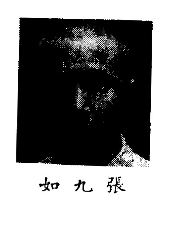 中文（中国大陆）: 制憲國民大會代表